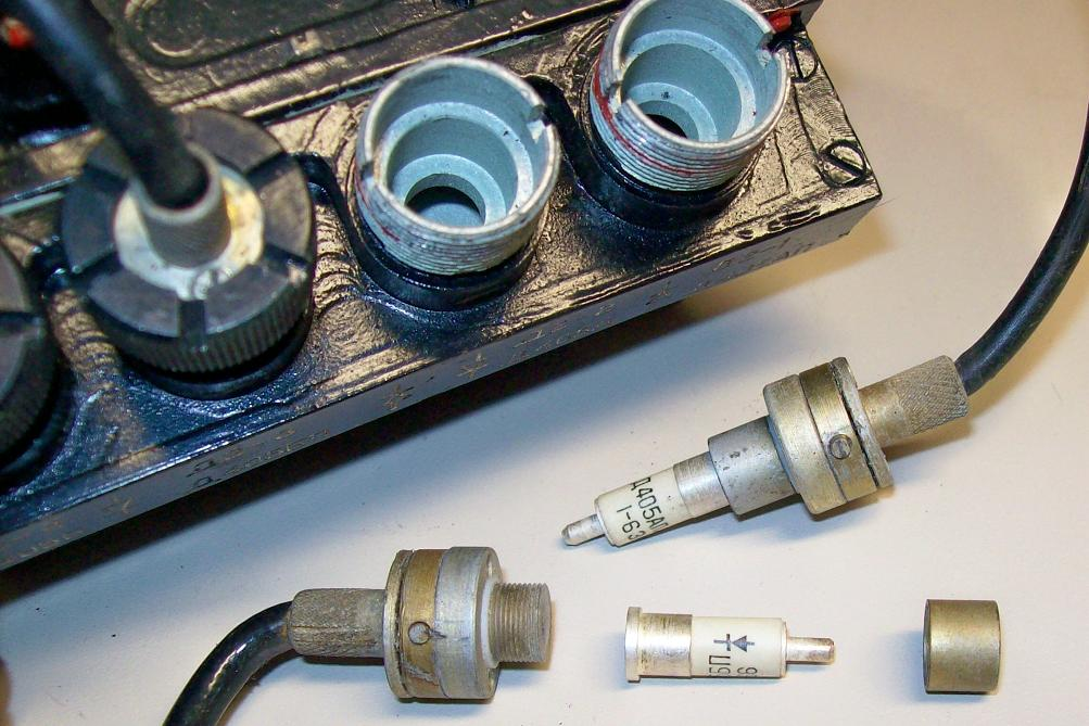 mixer unit of a radar receiver unit (sovjet union app. 1966, frequency 9 GHz)